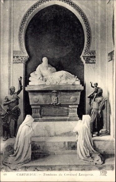 Tombeau du cardinal Lavigerie à Carthage. Ses restes ont été transférés à Rome en 1964 après l'indépendance de la Tunisie et la désacralisation de la cathédrale.